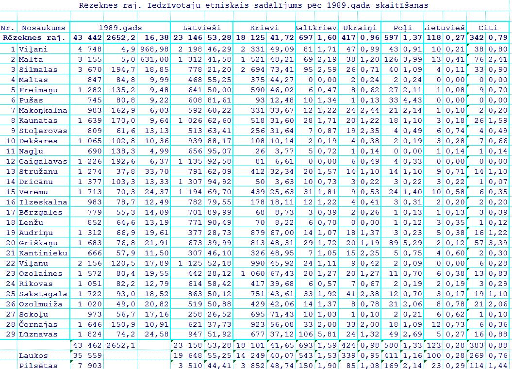 Этнический состав населения Латвии по переписи 1989 года